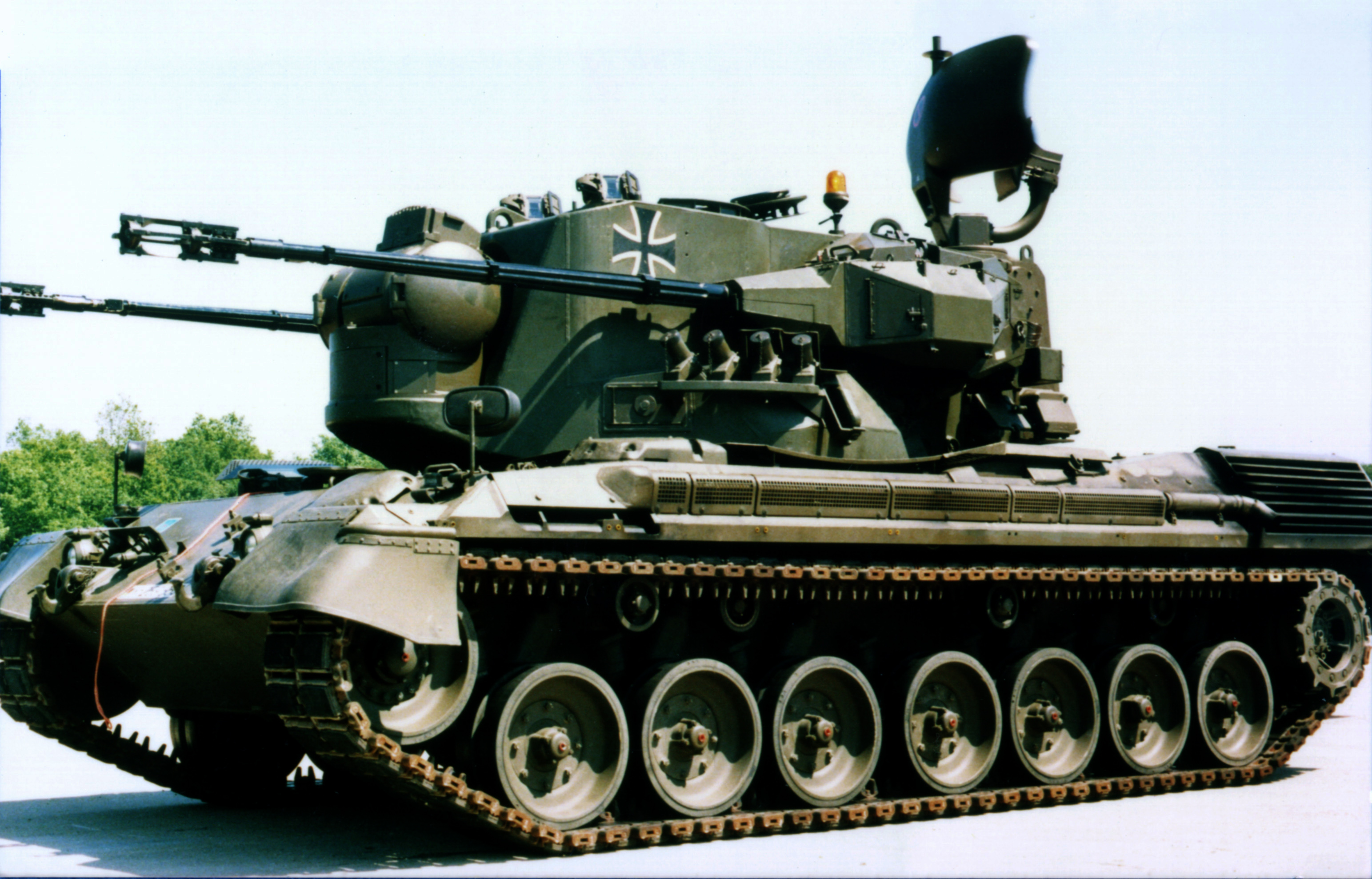 FLAK-Panzer Gepard bei einer Präsentation in der Donnerberg-Kaserne in Eschweiler.